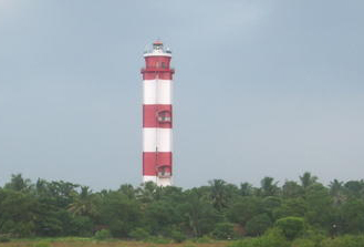 തീരത്ത് നിന്നുള്ള ചിത്രം